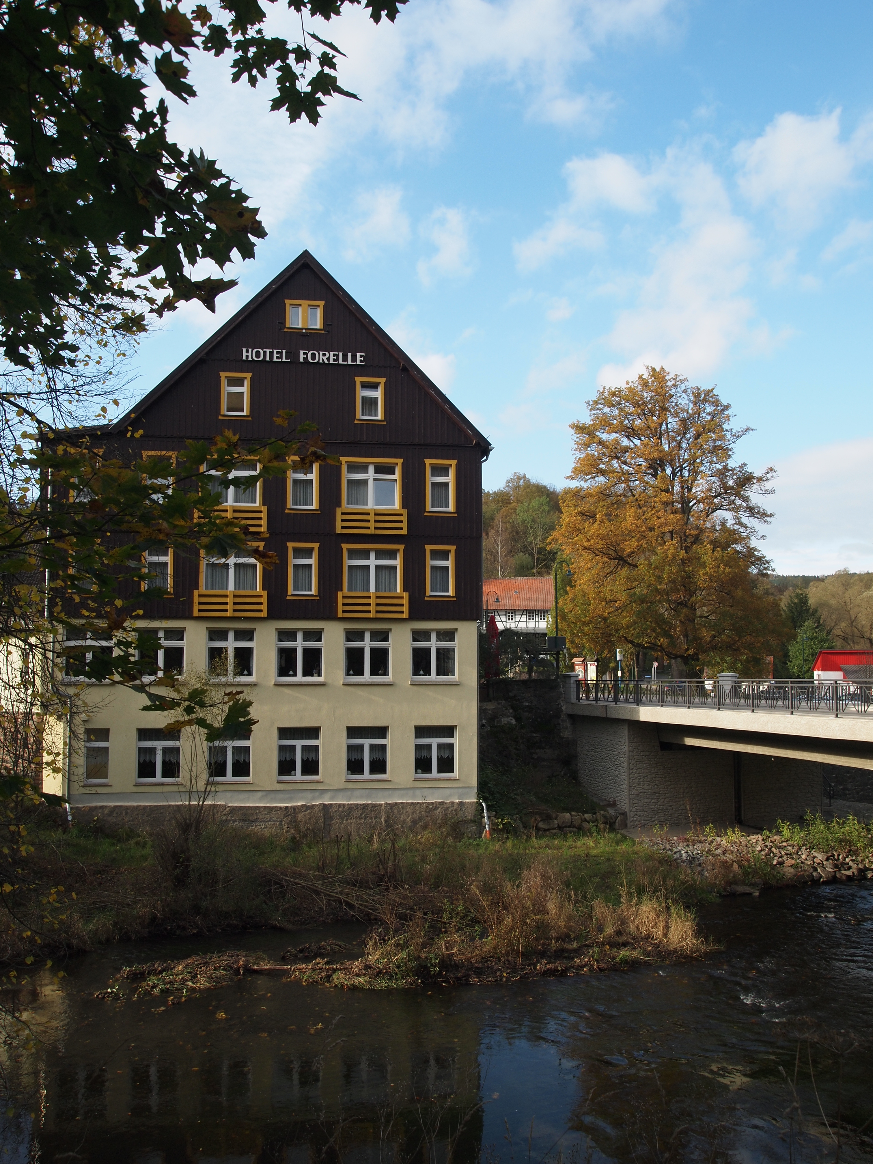 Treseburg (Stadt Thale, Landkreis Harz, Sachsen-Anhalt) Hotel "Forelle", Bode und Bodebrücke